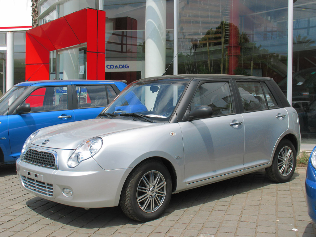 Lifan 320 1.3L Elite 2011